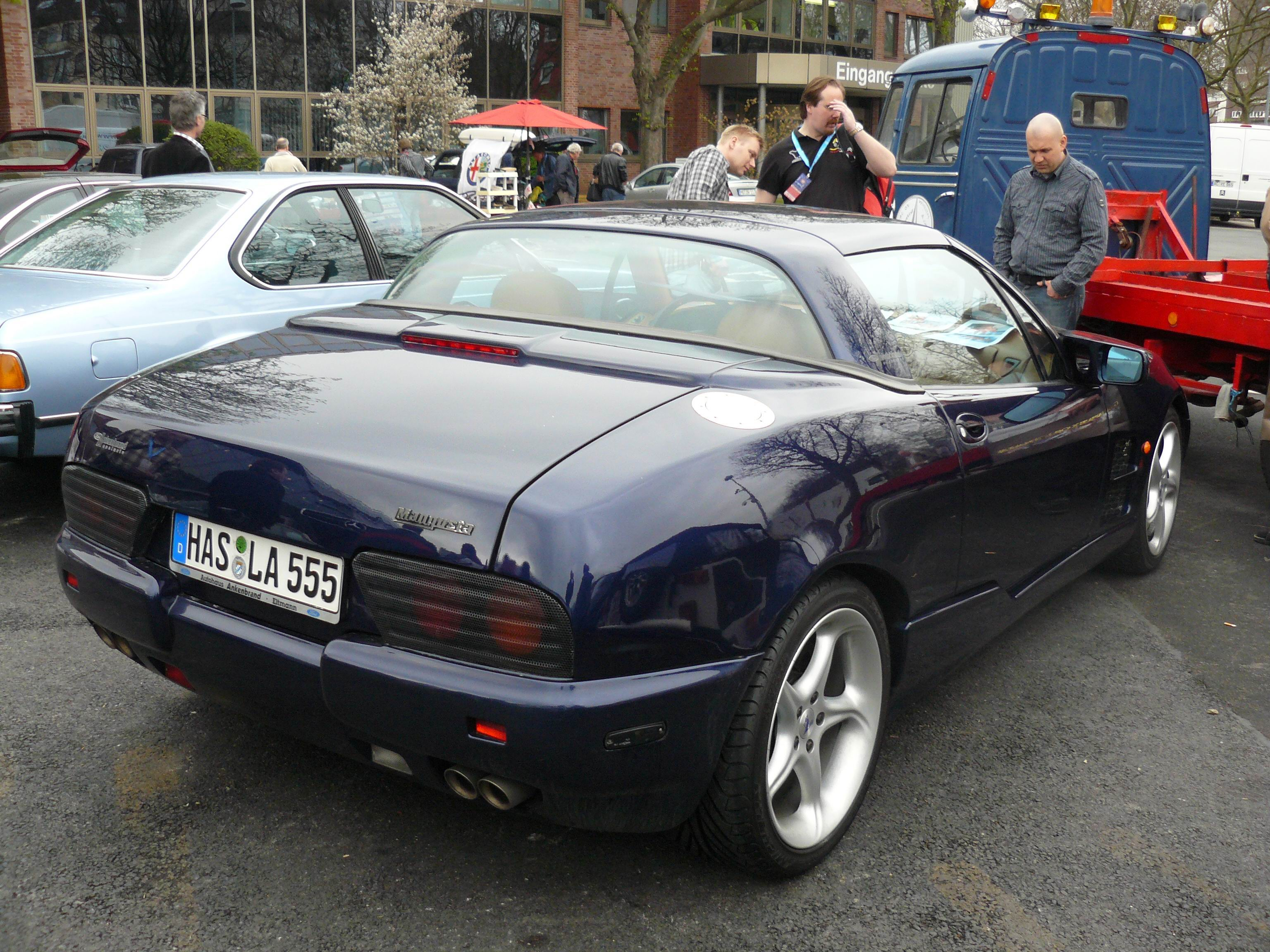 Techno Classica 2011